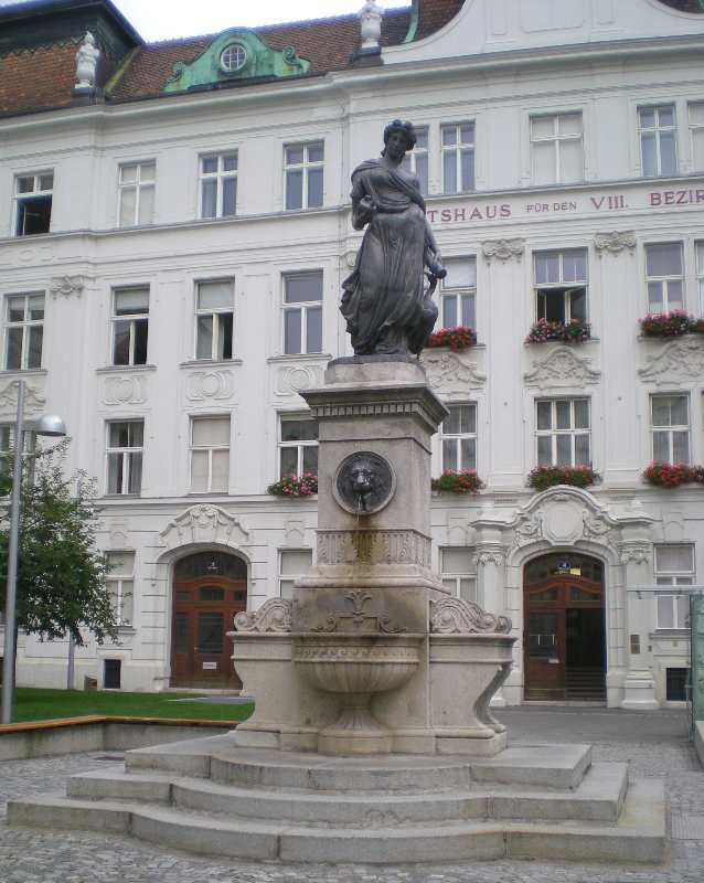 Der Wachsamkeitsbrunnen auf dem Schlesingerplatz in der Josefstadt in Wien